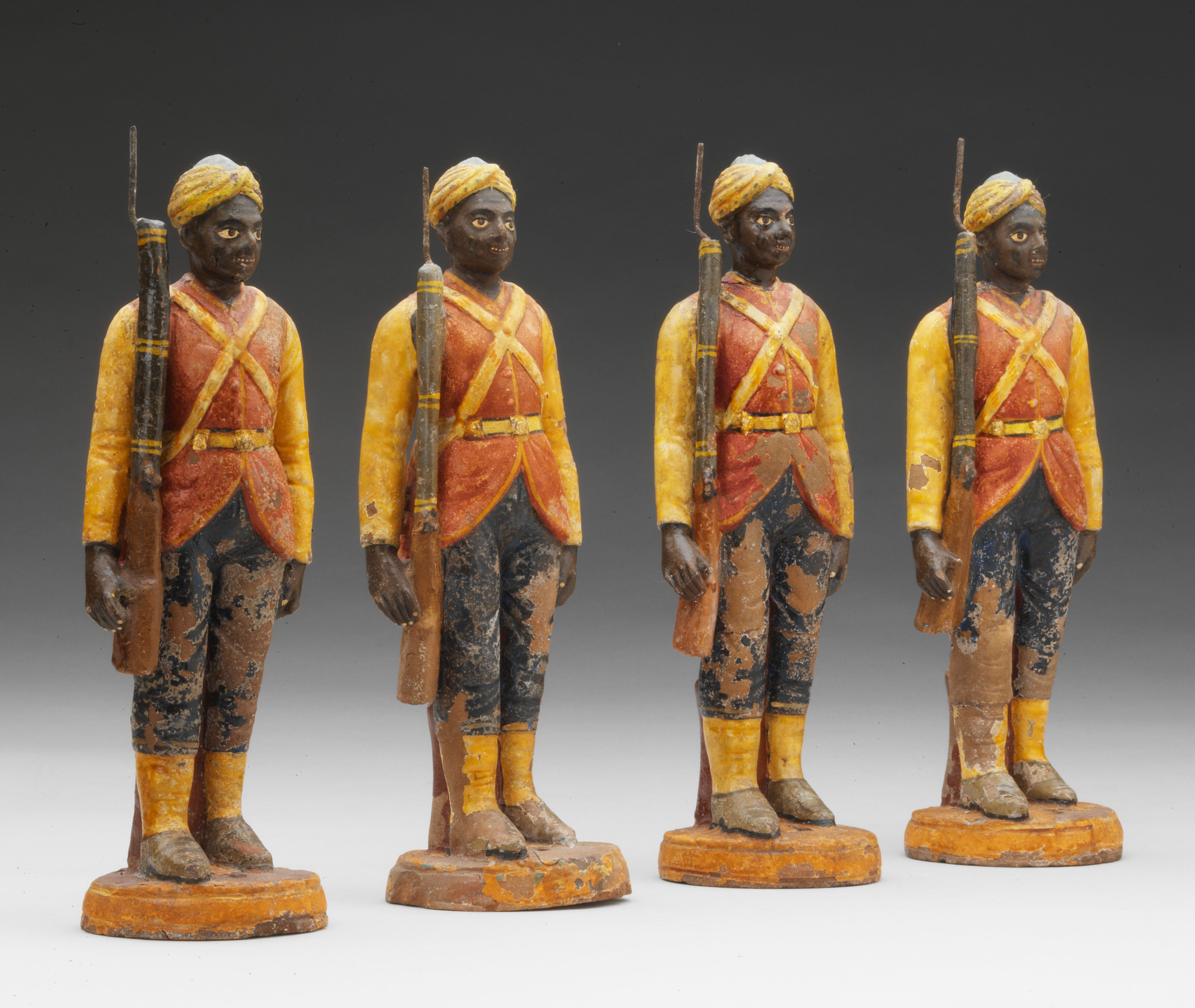 Soldaterregiment, sepoyere. Det britiske kolonistyre var i høj grad baseret på militær overlegenhed over for de lokale fyrster. Frem til 1857 var den britiske militære tilstedeværelse i Indien ligesom den øvrige koloniadministration underlagt det private handelskompagni East India Company. Langt de fleste underordnede soldater var dog indere, såkaldte sepoyere, der kom fra forskellige religiøse og kastemæssige baggrunde. Efter at et omfattende mytteri blandt de indiske soldater blev slået ned i 1857, overgik såvel den militære som den adminstrative magt til den britske kongemagt. Figurer, muligvis Lucknow, Indien. Bemalet ler, Mål: 24-30 cm høje. Antagelig1800-tallet. Mus.nr. D.3907a-c.